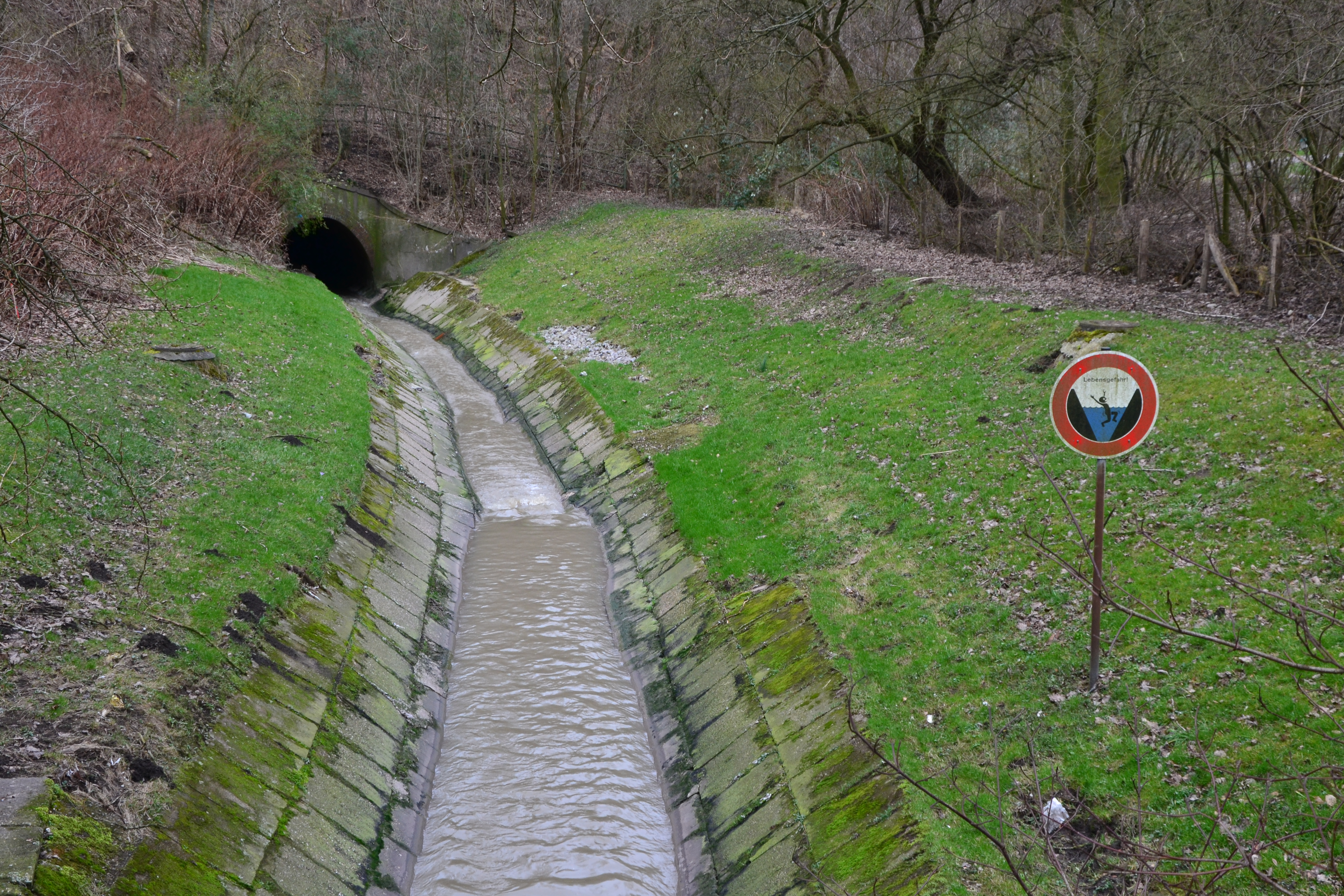 Borbecker Mühlenbach im Essener Stadtteil Altendorf von der Nöggerathstraße nach Süden gesehen, hier noch als Abwasserkanal genutzt.